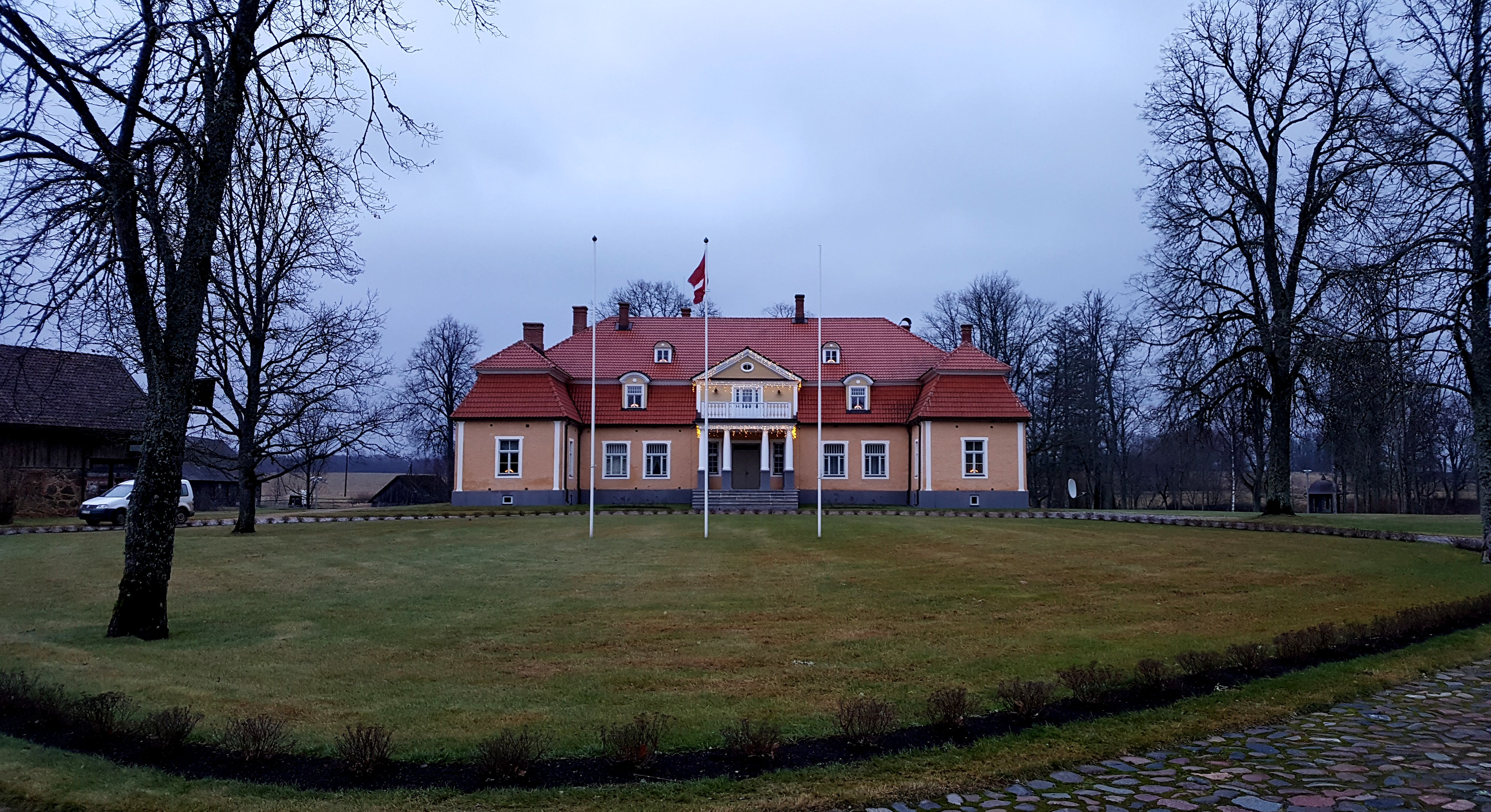 Ķirbiži mõisa peahoone 2016. aastal